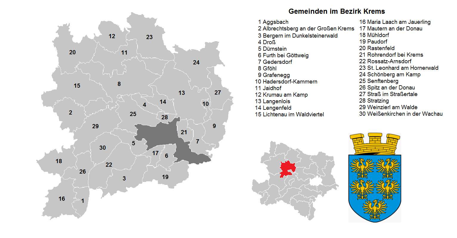 Bezirk Krems